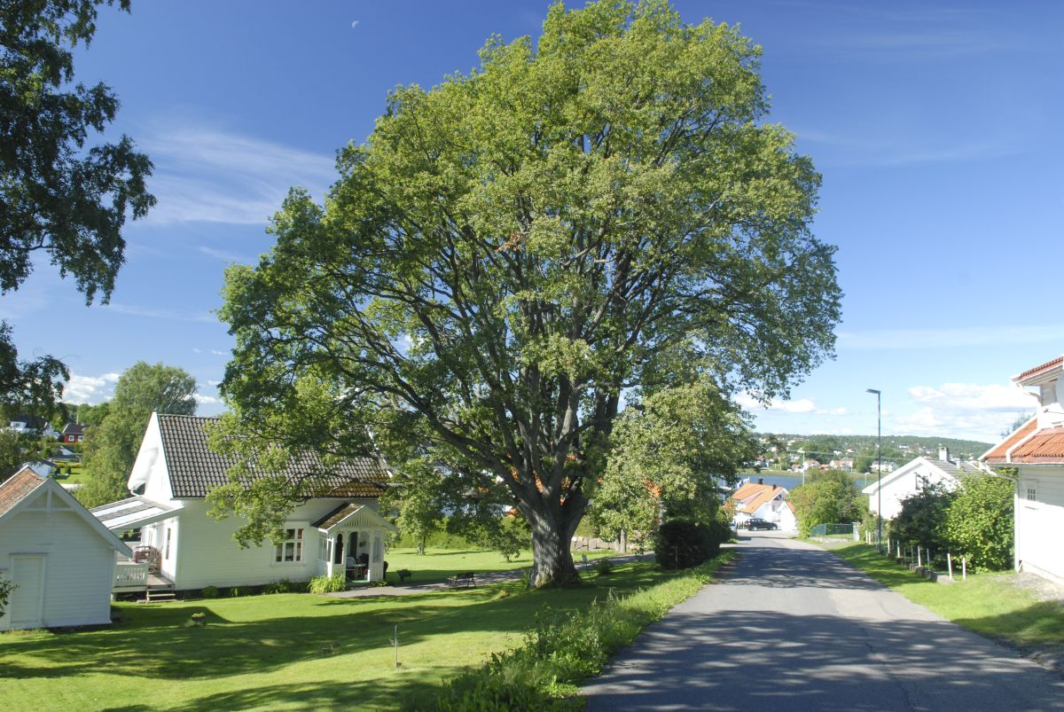 Kysteeika på Foynland.